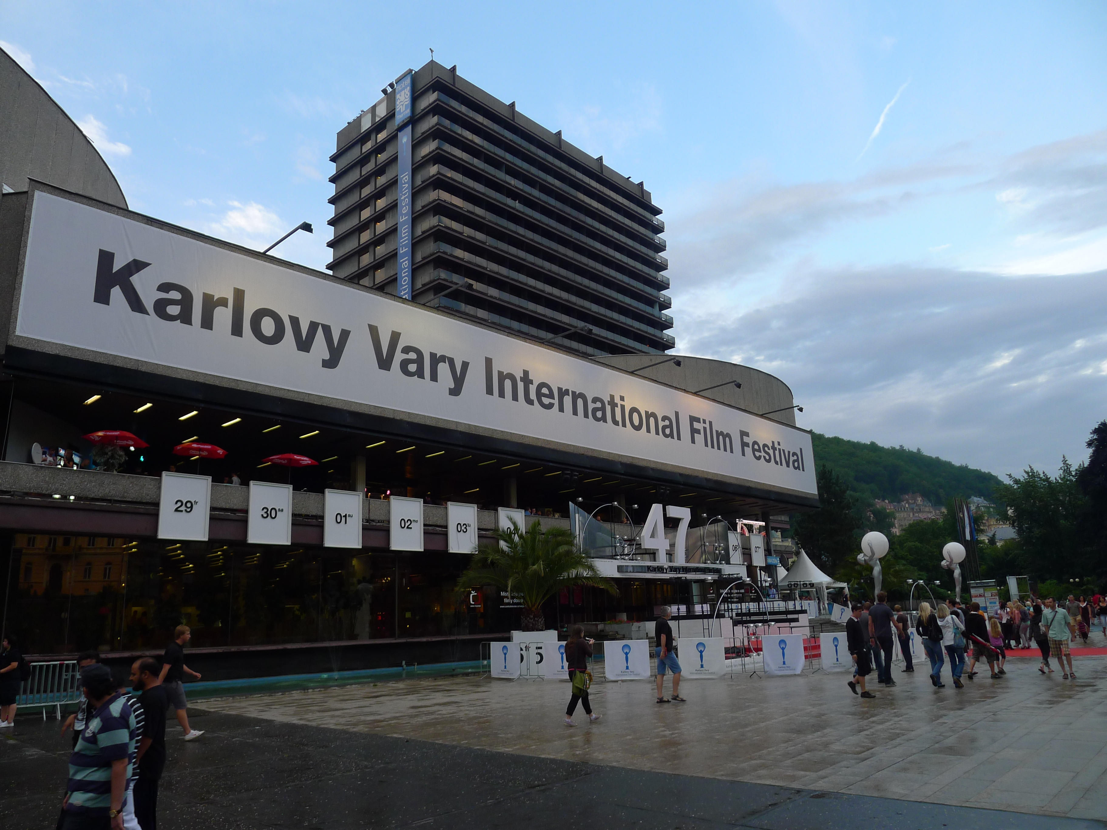 Hotel Thermal na 47. MFF Karlovy Vary